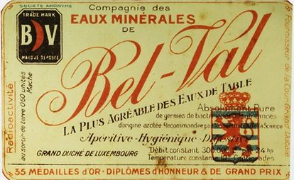 Eng Fläschenetiquette vun der Mineralwaasserquell Bel-Val.